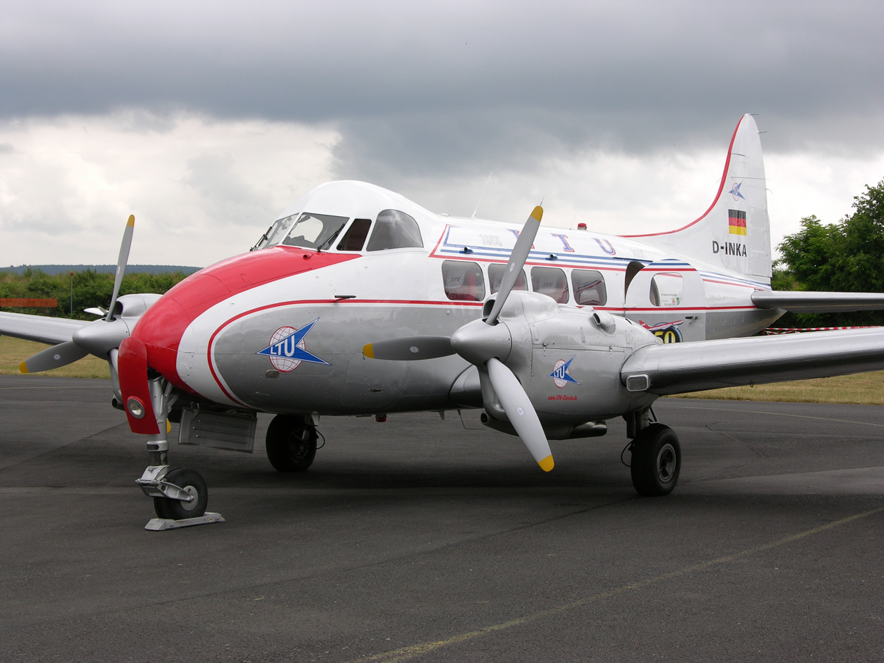 De Havilland D.H. 104 "Dove" bei einem ihrer ersten öffentlichen Einsätze nach der Restaurierung zum 50-jährigen Jubiläum der LTU.